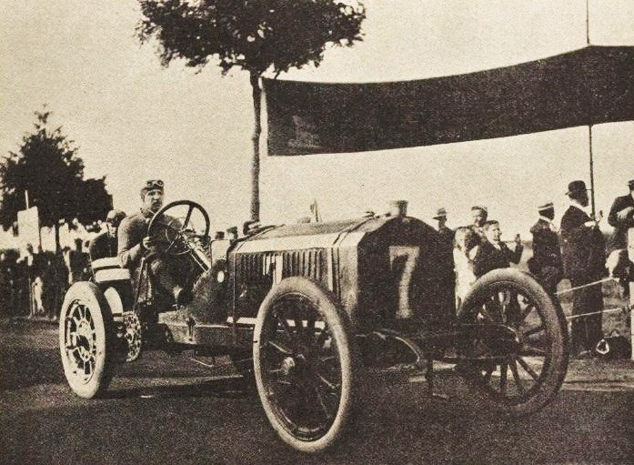 Arthur Duray, vainqueur du circuit des Ardennes 1906 - La Vie au Grand Air du 25 août 1906, p.621